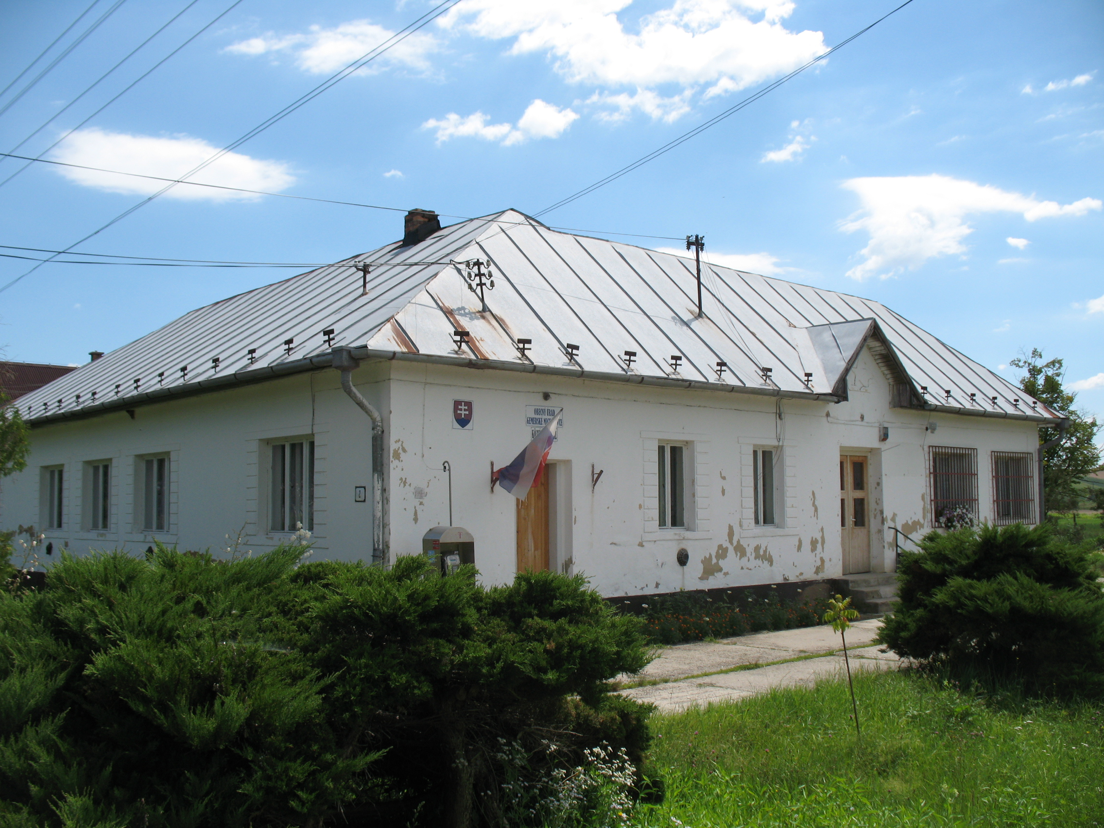 Gömörmihályfalva